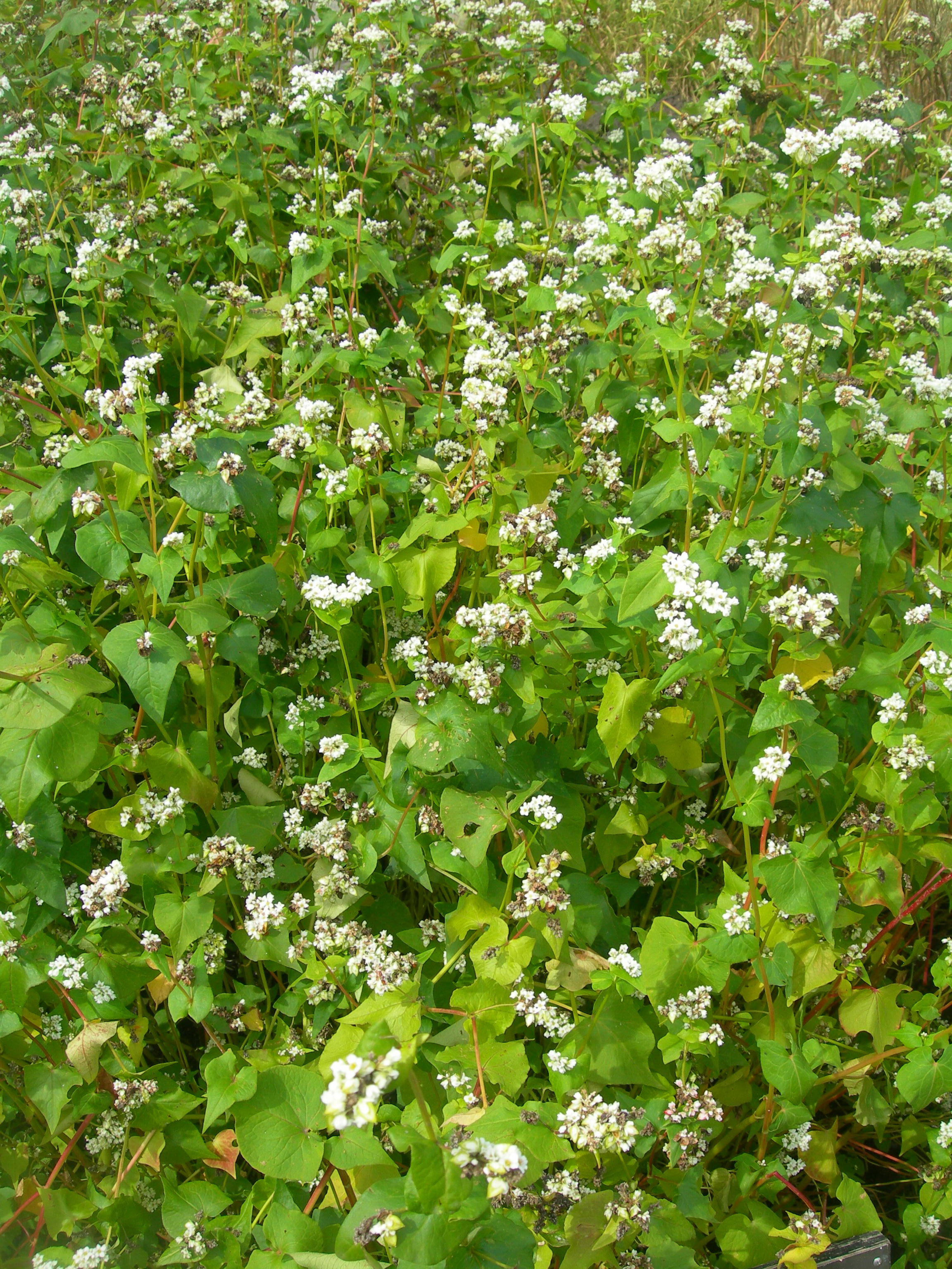 Fagopyrum sagittatum